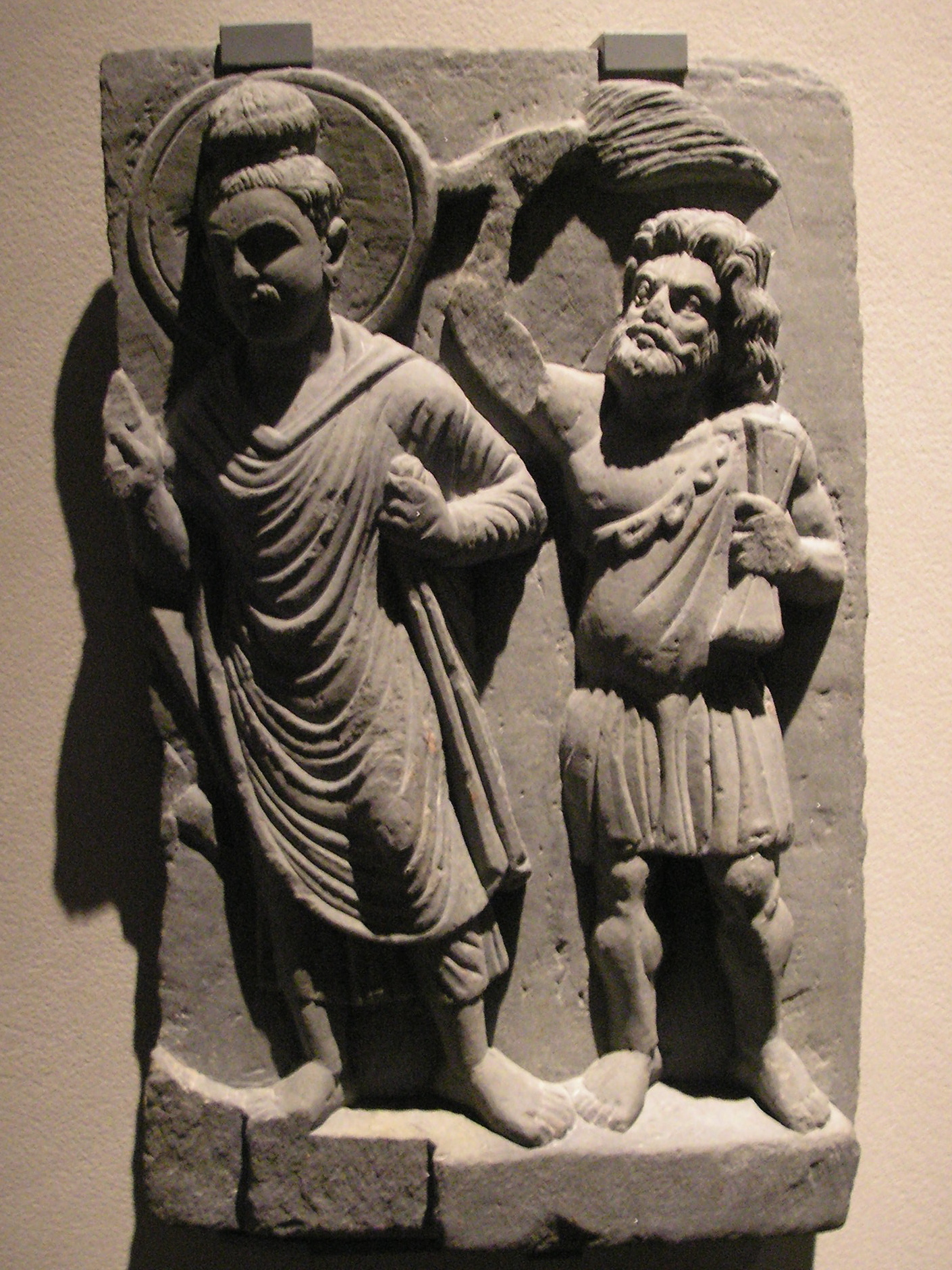 Buddha and Vajrapāni. Gandhara, 1st century CE. schist, height 39.0 cm. Located in the Museum für Indische Kunst, Berlin-Dahlem.